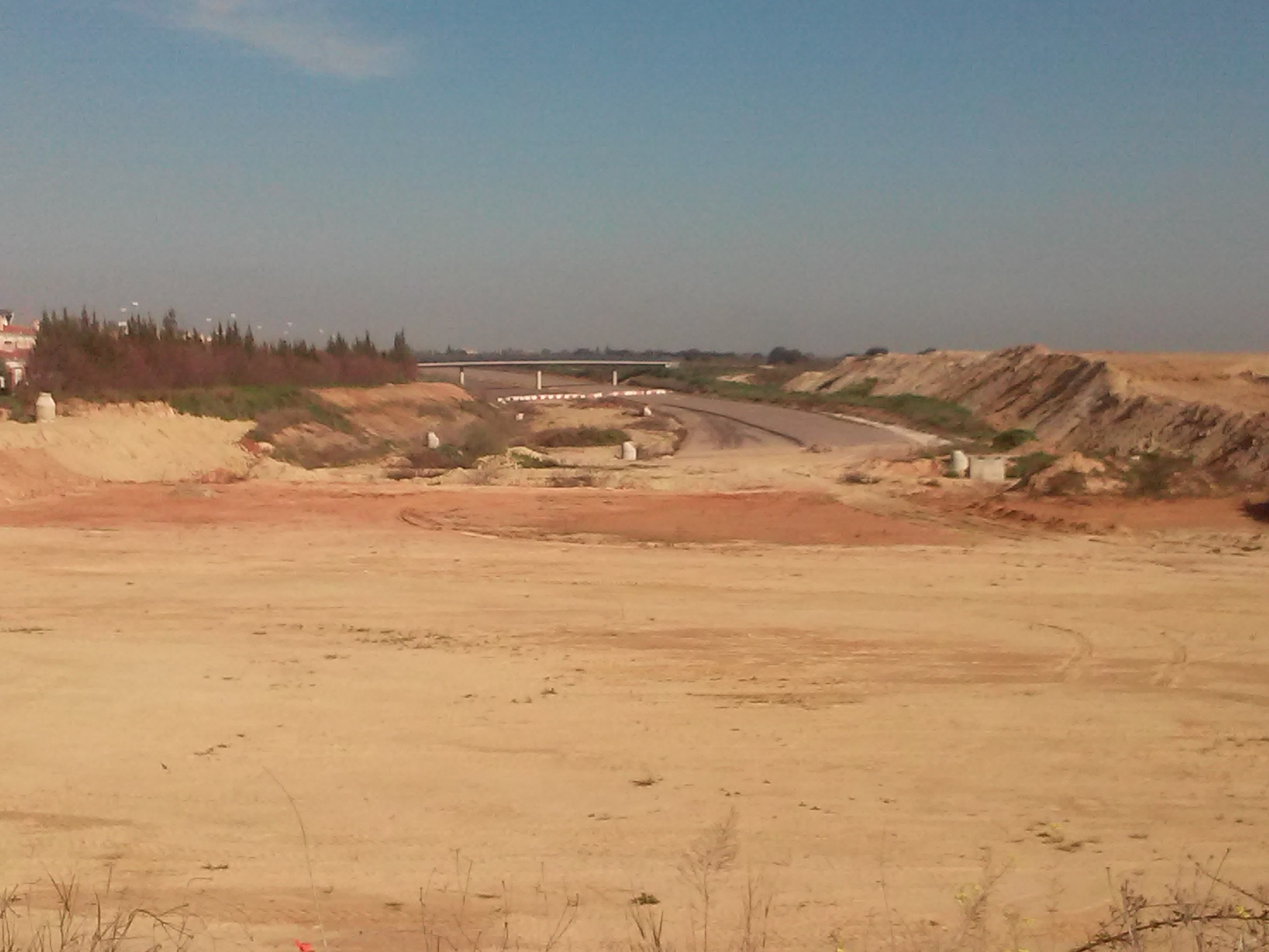 Estado de las obras de construcción de la SE-40 cerca de Almensilla, Sevilla